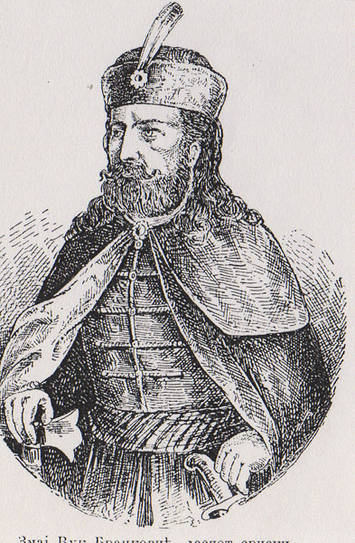 Змај Вук Бранковић, деспот српски. новинска ксилографија. око 1880.